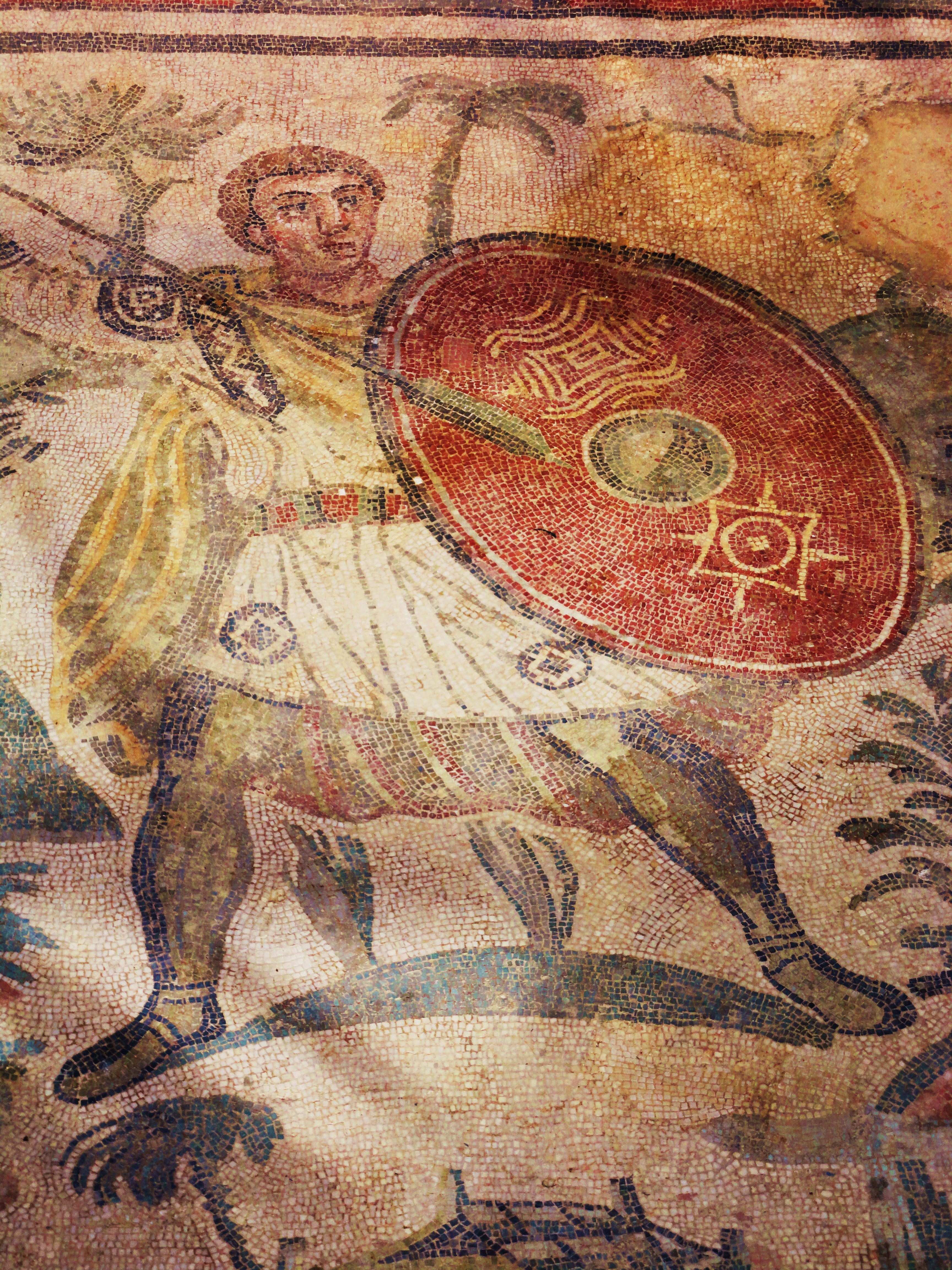 Villa romana di Piazza Armerina - Sicilia - soldato